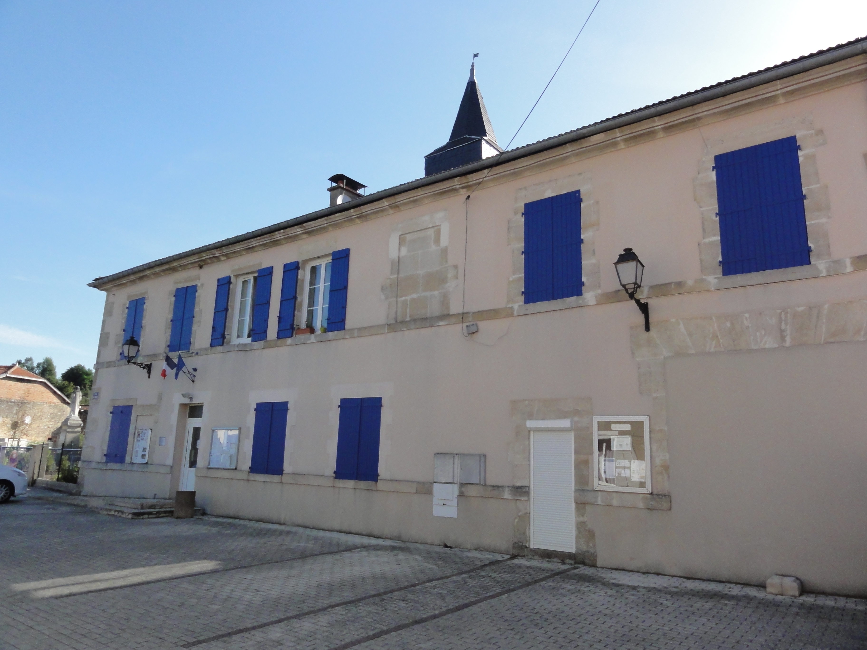 Sommelonne (Meuse) mairie